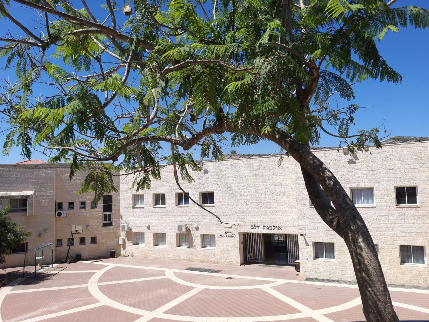 הבנין המרכזי